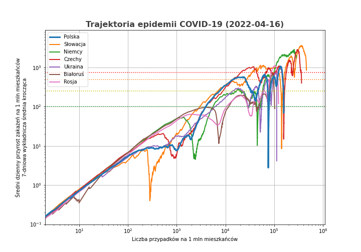 Trajektoria przebiegu epidemii COVID-19 w Polsce i państwach sąsiednich. Liczby na osiach podane na 1mln mieszkańców, co pozwala porównać na jakim etapie zaawansowania infekcji państwa wprowadziły swoje strategie walki z epidemią i jak są one skuteczne. Trzeba pamiętać że taka ocena etapu epidemii jest bardzo zależna od powszechności i skuteczności przeprowadzanych testów.